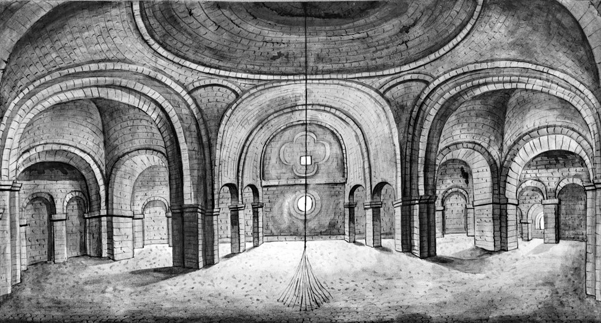 Keizerzaal in het westwerk van de Sint-Servaaskerk, Maastricht. Het touw is voor het luiden van Grameer, de 6350 kg zware klok uit 1515. Reproductie van tekening door Philippe van Gulpen, midden 19e eeuw.